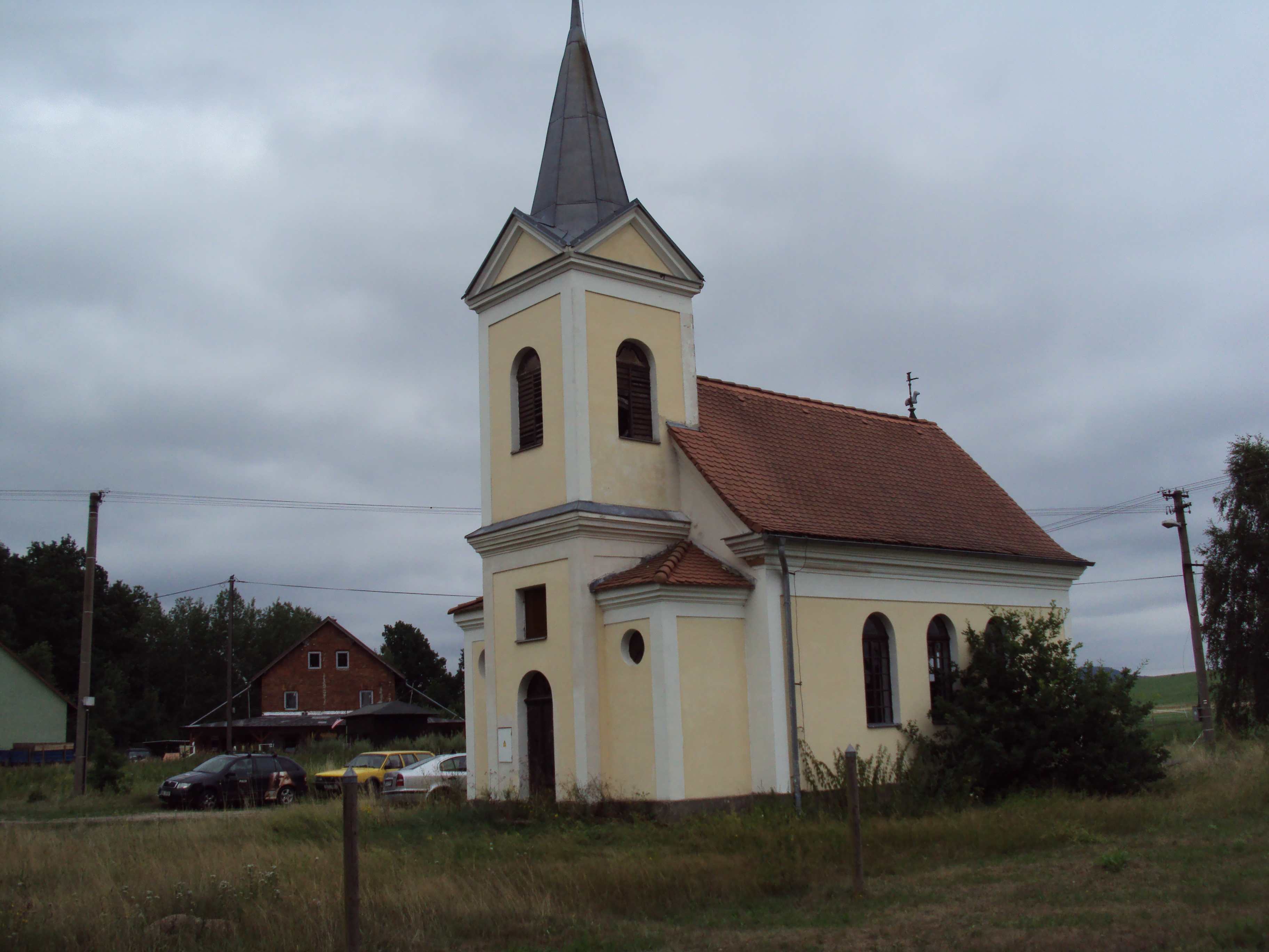 Kostelík v Heřmaničkách, východní část České Lípy